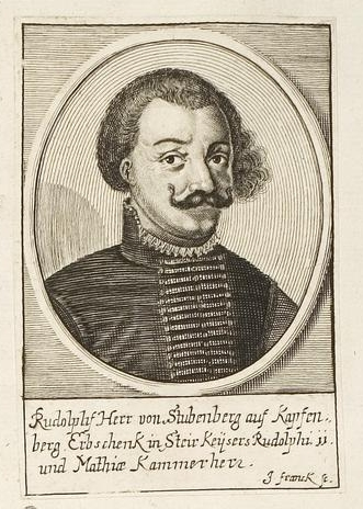 Grafik aus dem Klebeband Nr. 1 der Fürstlich Waldeckschen Hofbibliothek Arolsen Motiv: Rudolph von Stubenberg († 1620)